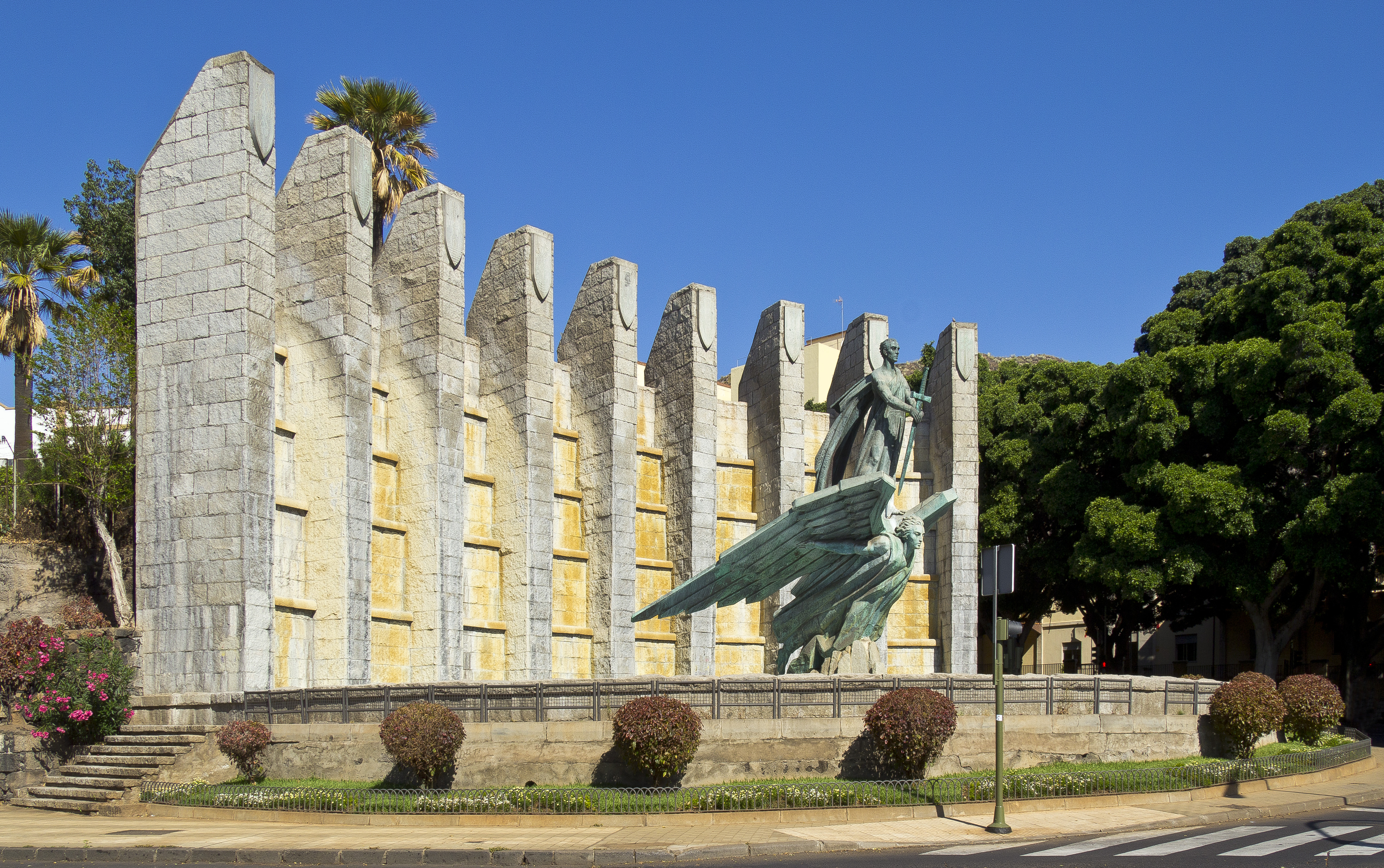 Das Monumento al General Franco wurde von dem Künstler Juan de Ávalos y Taborda im Jahr 1964 entworfen. Es befindet sich in Santa Cruz de Tenerife an der Einmündung der Rambla de Santa Cruz in die Avenida Francisco Larroche.